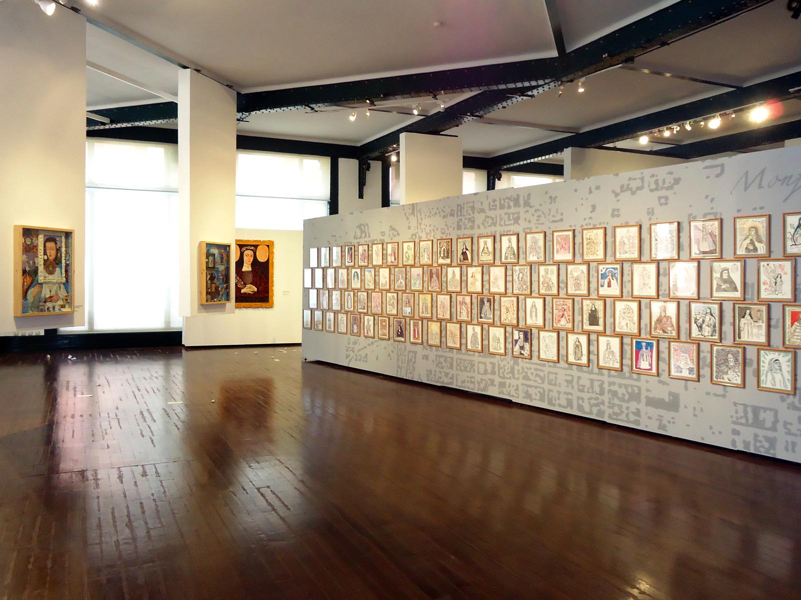 Mural de dibujos enmarcarcados "Monjápolis" (derecha) y ensamblajes o callages de "monjas territorio" de Antonio Álvarez Morán en la exposición "Intersección cuatro" de Capillla del Arte UDLAP.